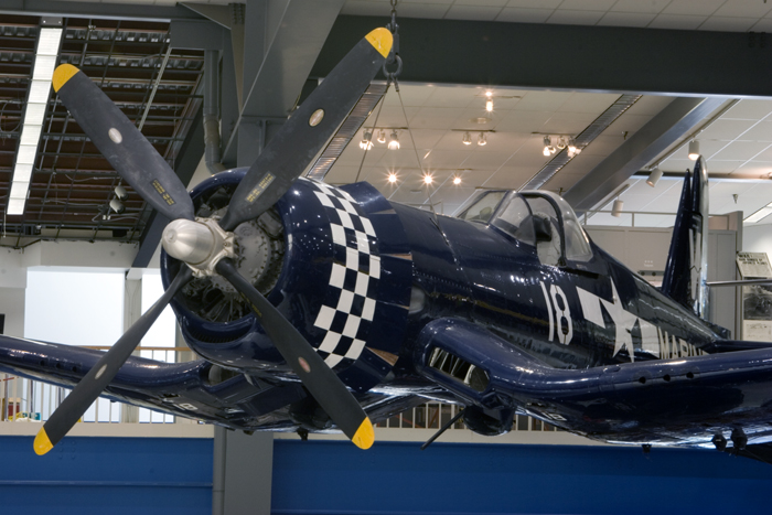 F4U-4 Bu 97142 at Naval Air Museum